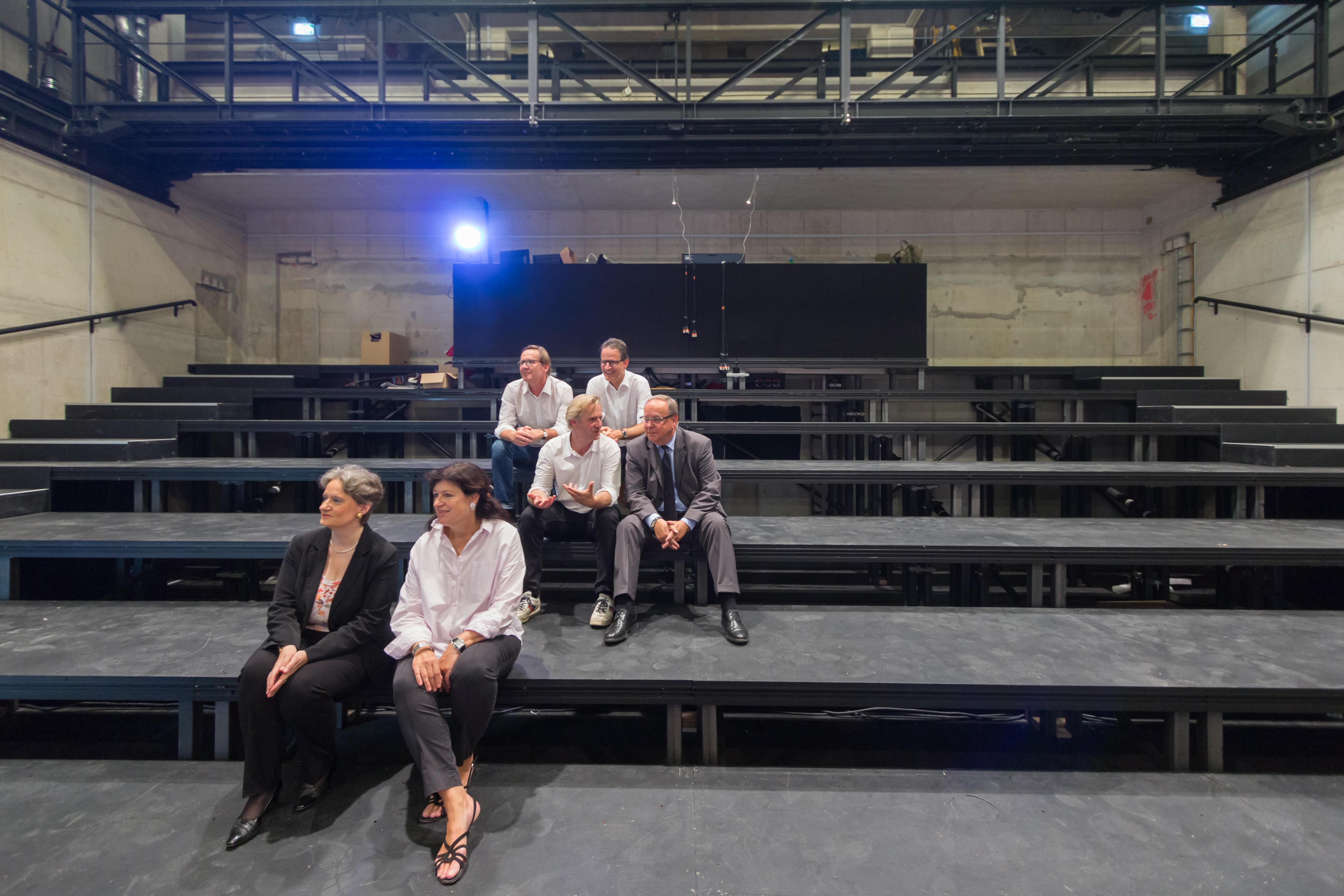 Fototermin Nutzungsbeginn „Außenspielstätte am Offenbachplatz“, Schauspiel Köln Foto im noch unbestuhlten Zuschauerbereich: Vorne: Kulturdezernentin Susanne Laugwitz-Aulbach, Dr. Birgit Meyer (Intendantin Oper Köln) Mitte: Stefan Bachmann (Intendant Schauspiel Köln), Bernd Streitberger (Technischer Betriebsleiter Bühnen Köln) Hinten: Remigiuz Otrzonsek (HPP Architekten), Patrick Wasserbauer (Geschäftsführender Direktor Bühnen Köln)